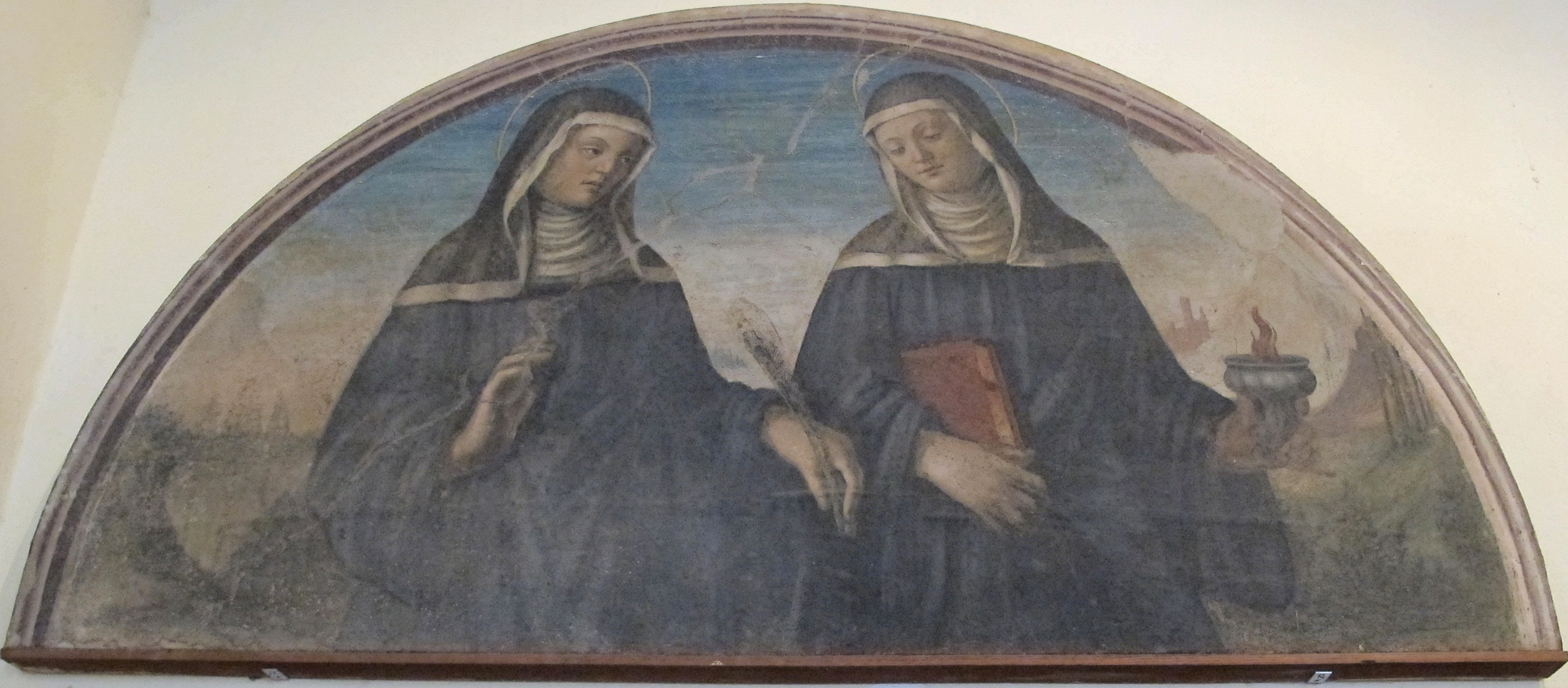 Museo Nazionale d'Arte Medievale e Moderna - MIBAC This is a photo of a monument which is part of cultural heritage of Italy.